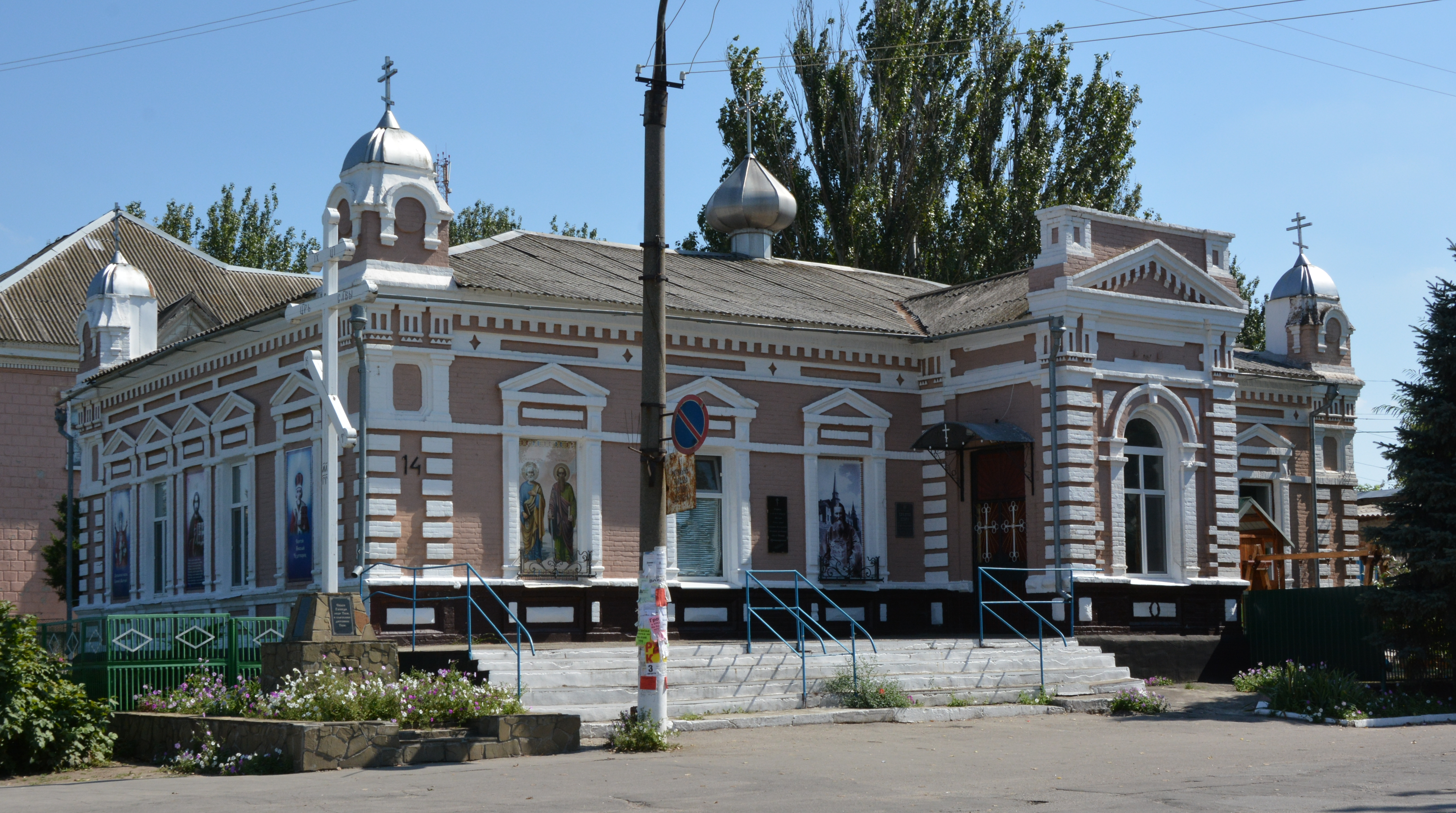 Земська чотирикласна школа, Василівка, вул. Леніна, 12